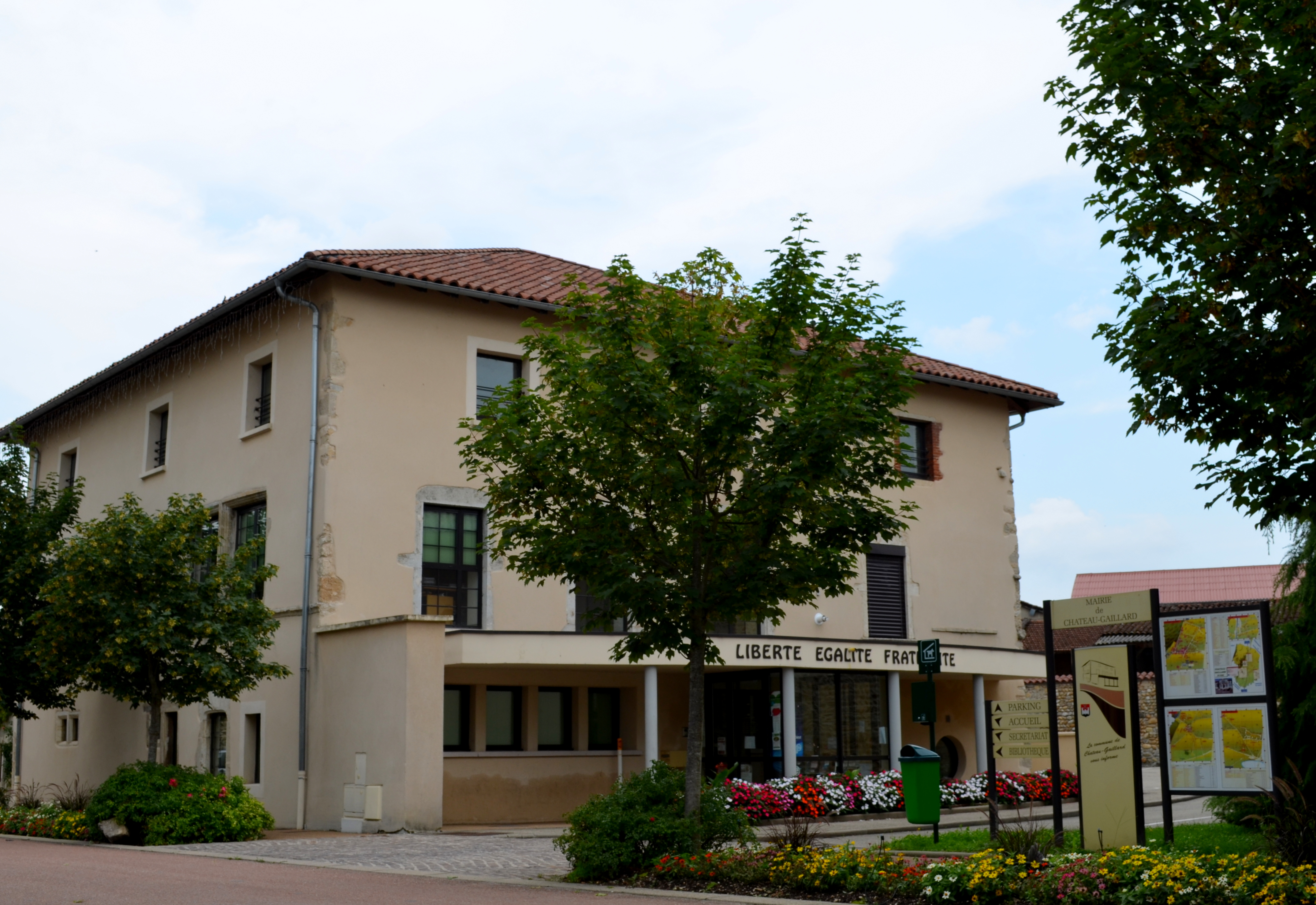 Mairie de Château-Gaillard (Ain).